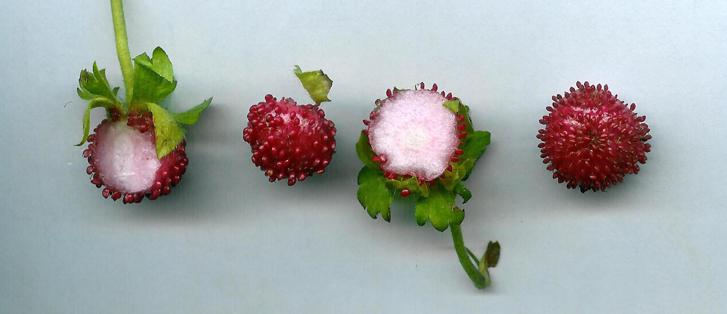 coupes transversale et longitudinale du fruit du fraisier des Indes (Potentilla indica)